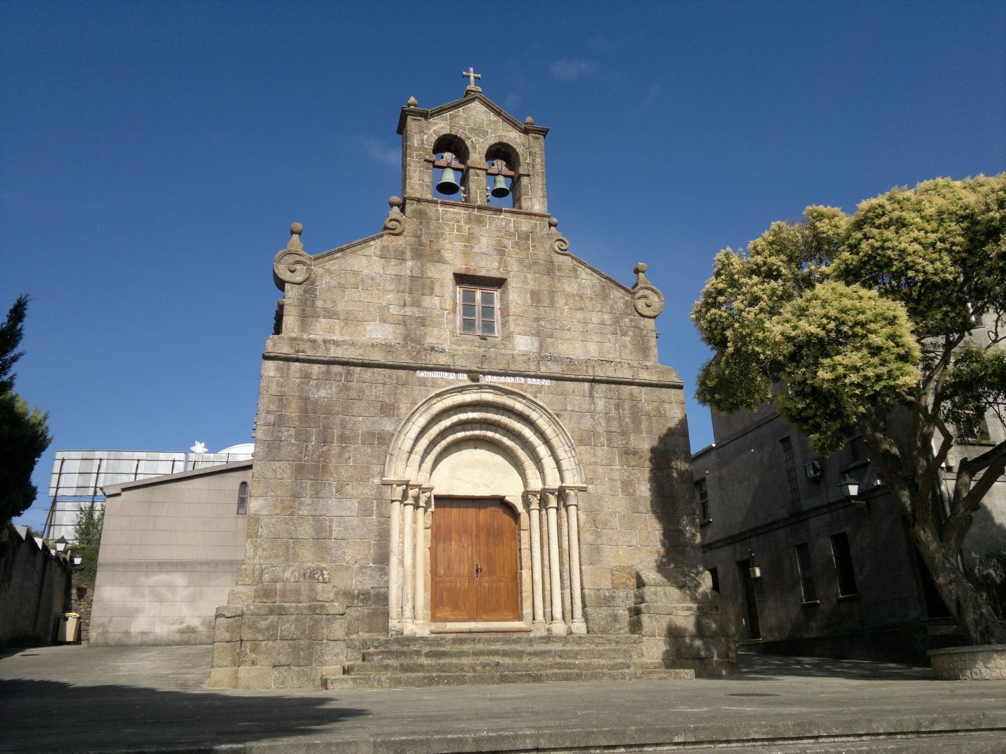 Igrexa de San Vicenzo de Elviña (Elviña, A Coruña)